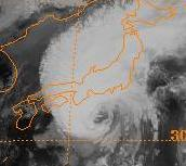 Typhoon Judy making landfall in Japan on 1982-09-12